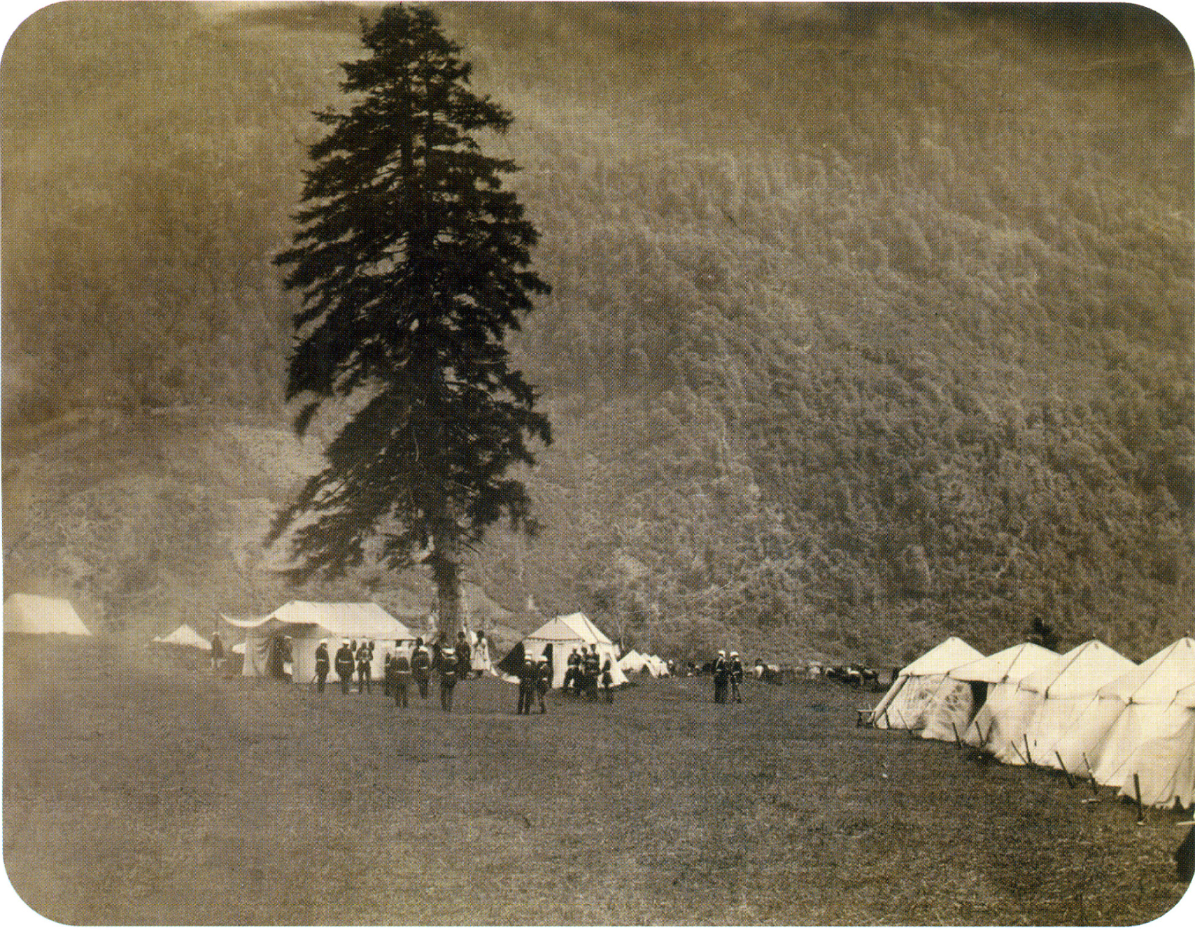 Фотография, сделанная в лагере русских войск в Кбаадэ (ныне Красная Поляна) 21 мая 1864 года. Здесь состоялся парад русских войск, символизирующий окончание Кавказской войны.